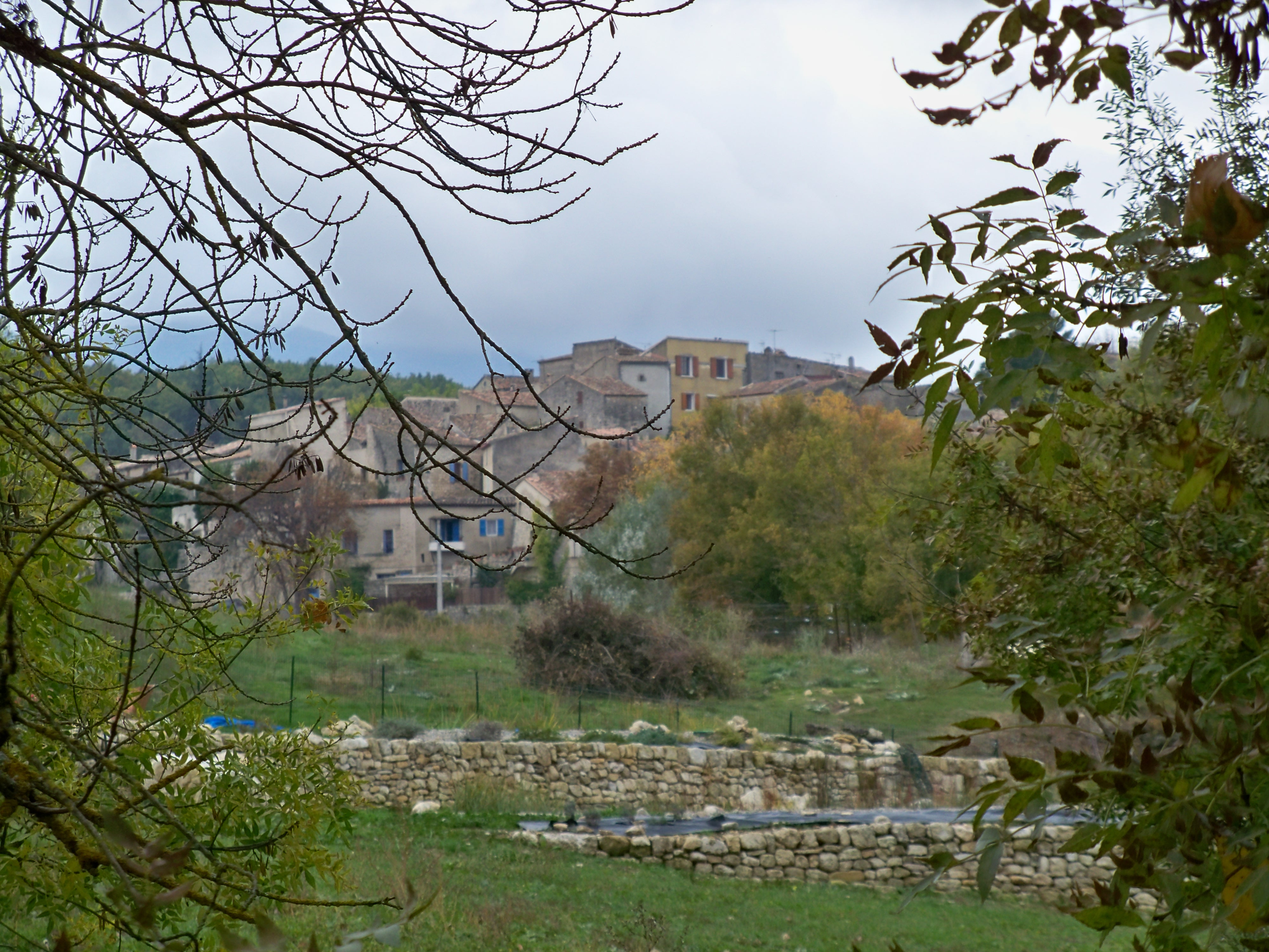 Céreste, Alpes de Haute Provence, France